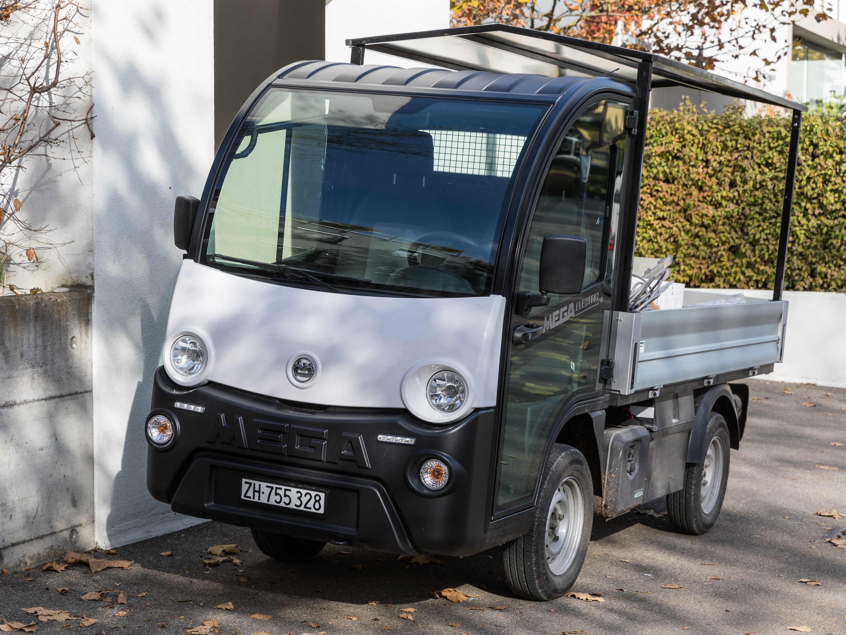 Mega Electric e-worker beim Zoo Zürich